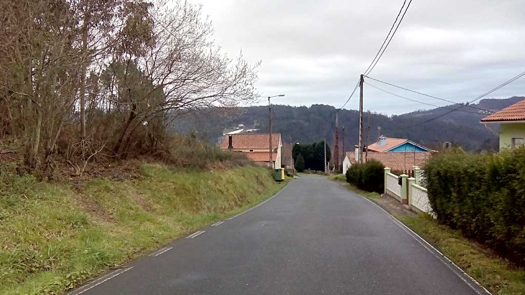 Vista do Carballo Furado, Doso, Narón.